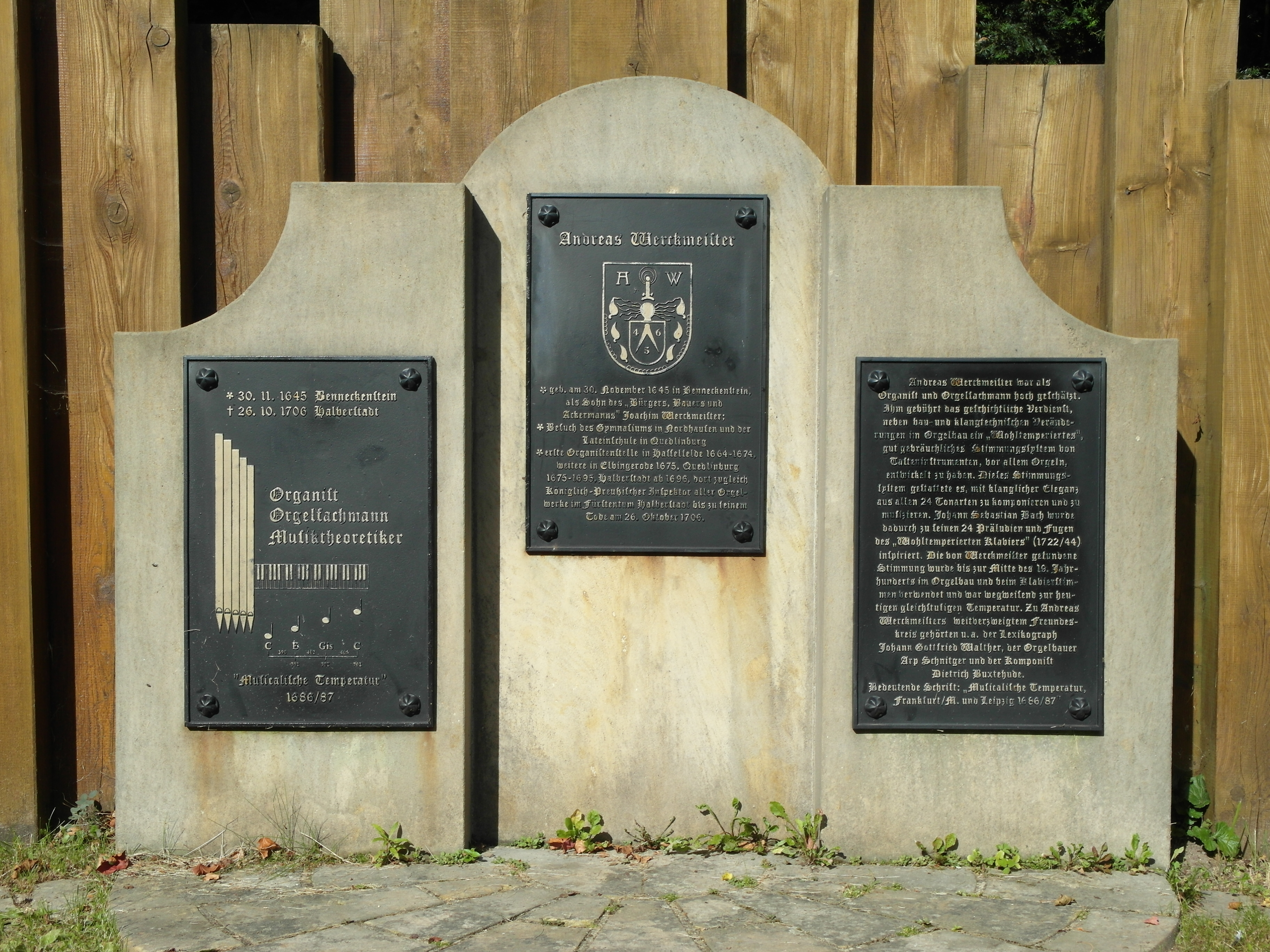 Denkmal für Andreas Werckmeister in seiner Heimatstadt Benneckenstein